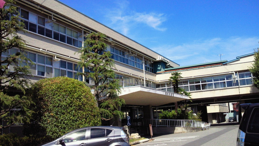 飯田市役所庁舎です